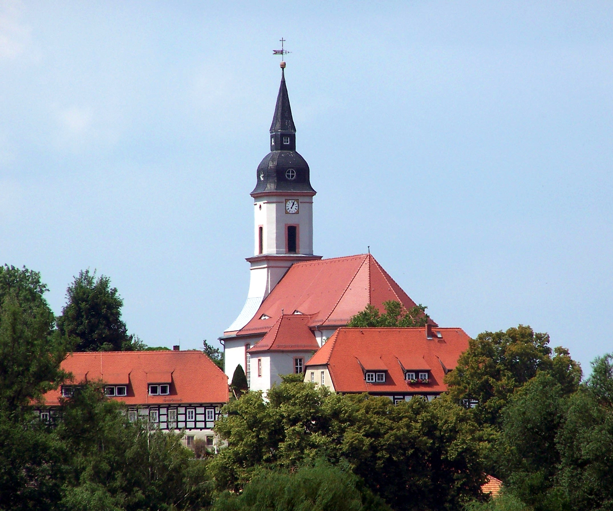 Michaeliskirche Zehren, Gemeinde Diera-Zehren, Landkreis Meißen